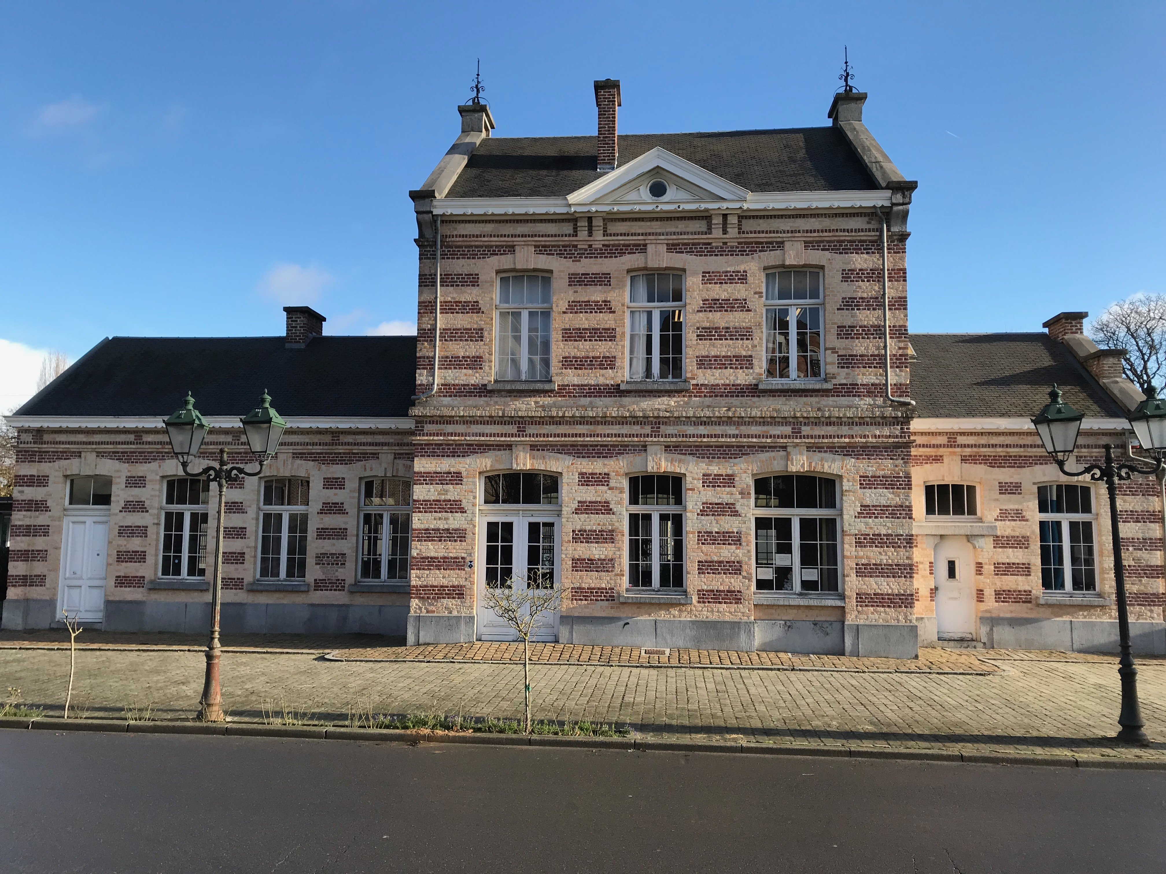 station ferroviaire